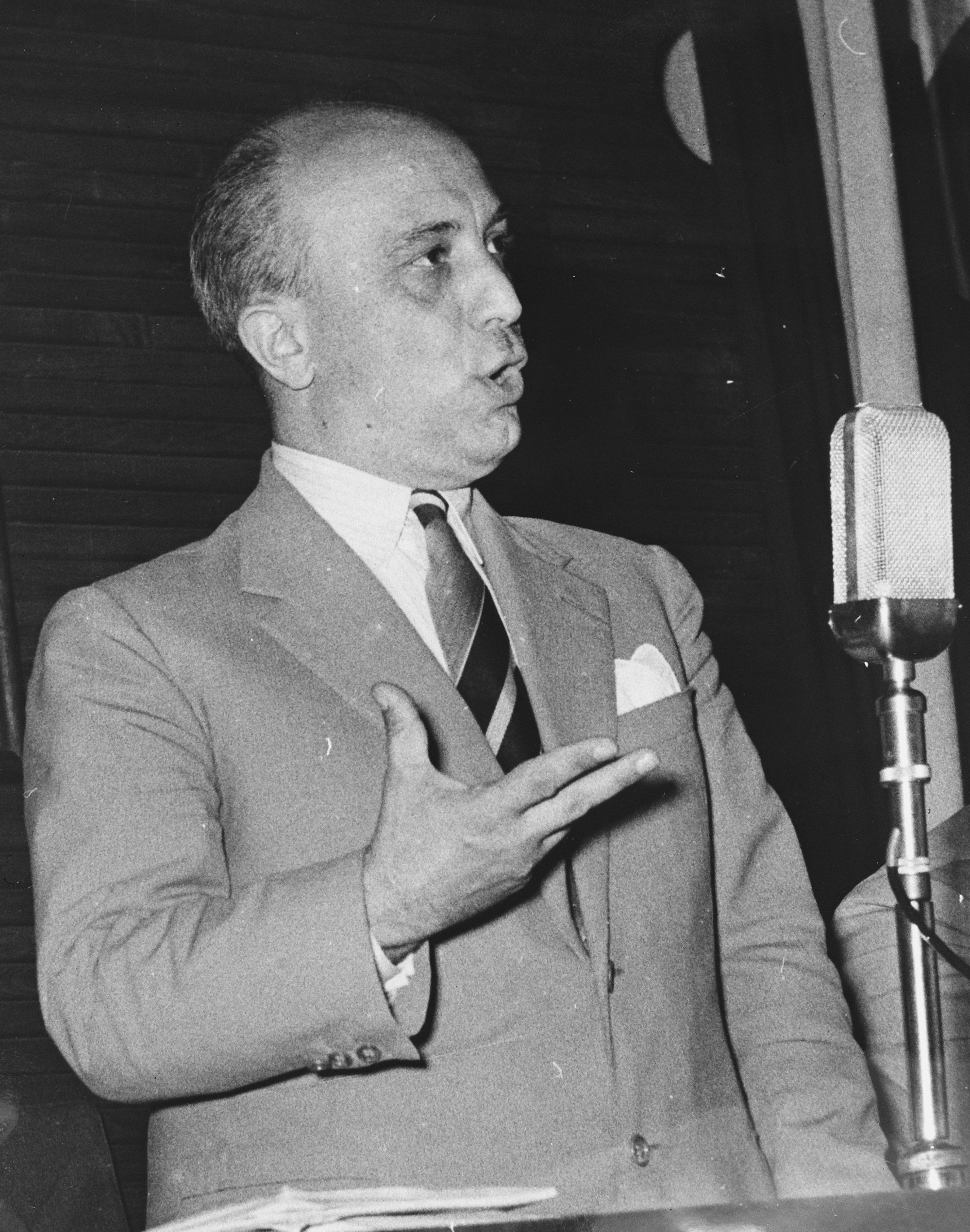 Collectie / Archief : Fotocollectie Anefo Reportage / Serie : [ onbekend ] Beschrijving : Staatsman Fanfani Italie kabinetsformateur Datum : 13 januari 1954 Locatie : Italië Trefwoorden : kabinetsformateurs, staatsmannen Persoonsnaam : FANFANI Fotograaf : Fotograaf Onbekend / Anefo Auteursrechthebbende : Nationaal Archief Materiaalsoort : Glasnegatief Nummer archiefinventaris : bekijk toegang 2.24.01.09 Bestanddeelnummer : 906-2444